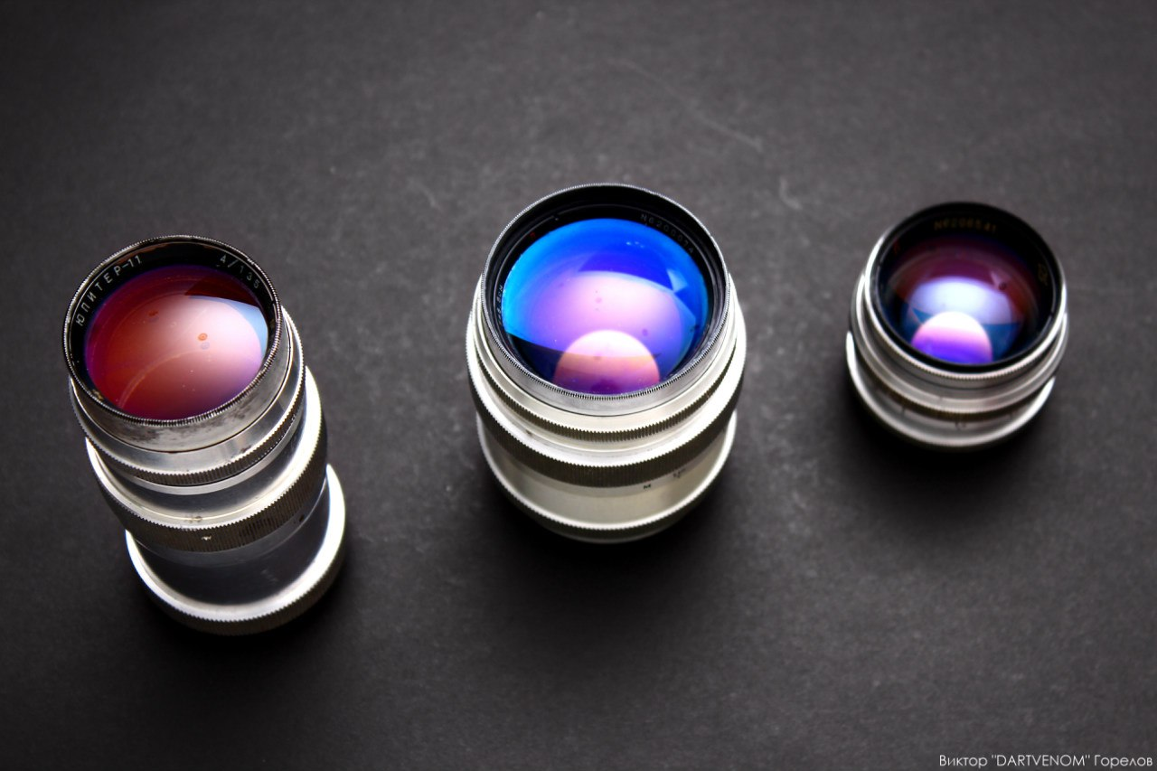 Объективы серии Юпитер для дальномерных фотокамер